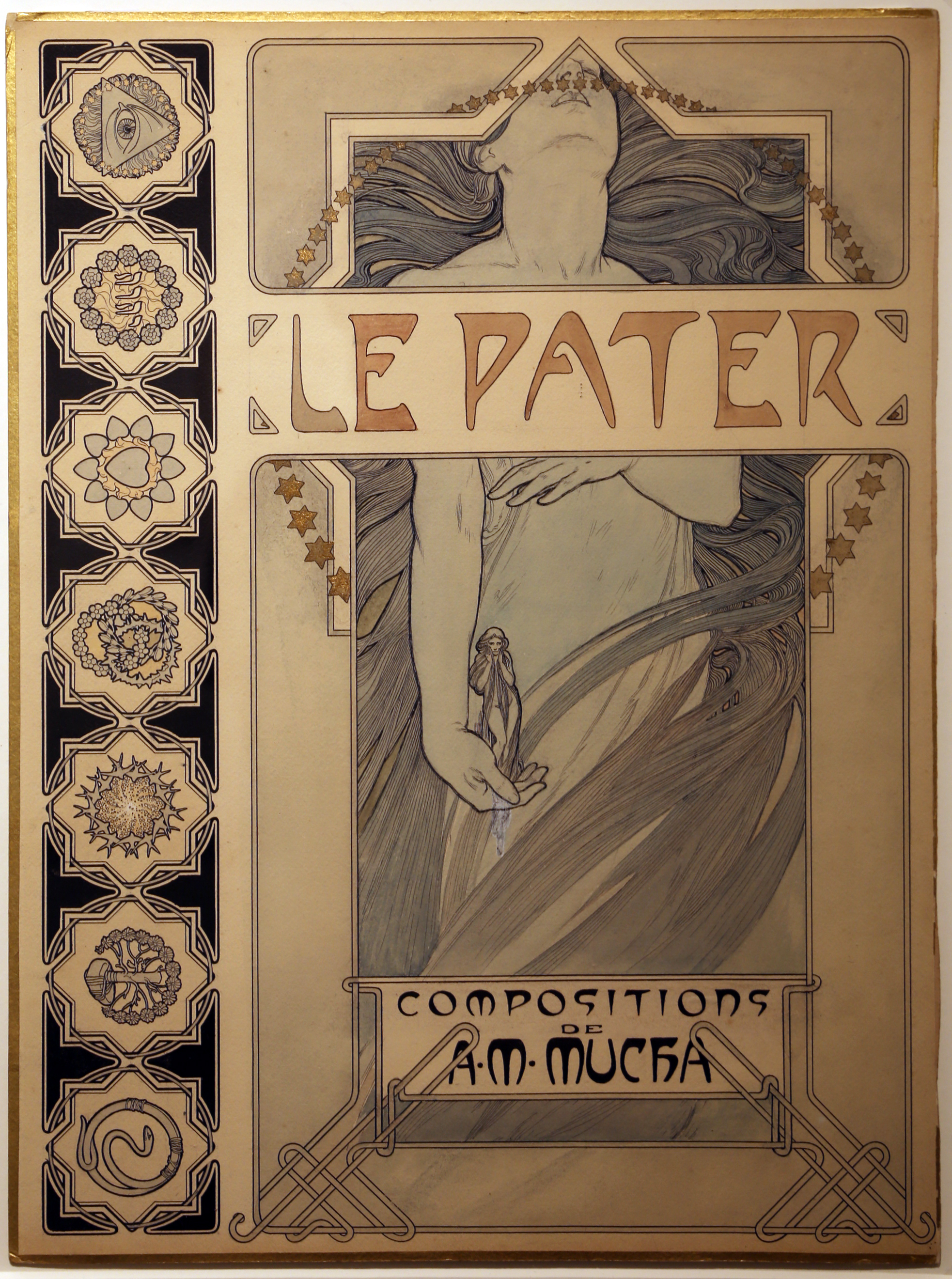 Miramare This is a photo of a monument which is part of cultural heritage of Italy. The authorisation for taking photos of this object was provided by the World Wide Fund for Nature Italy.